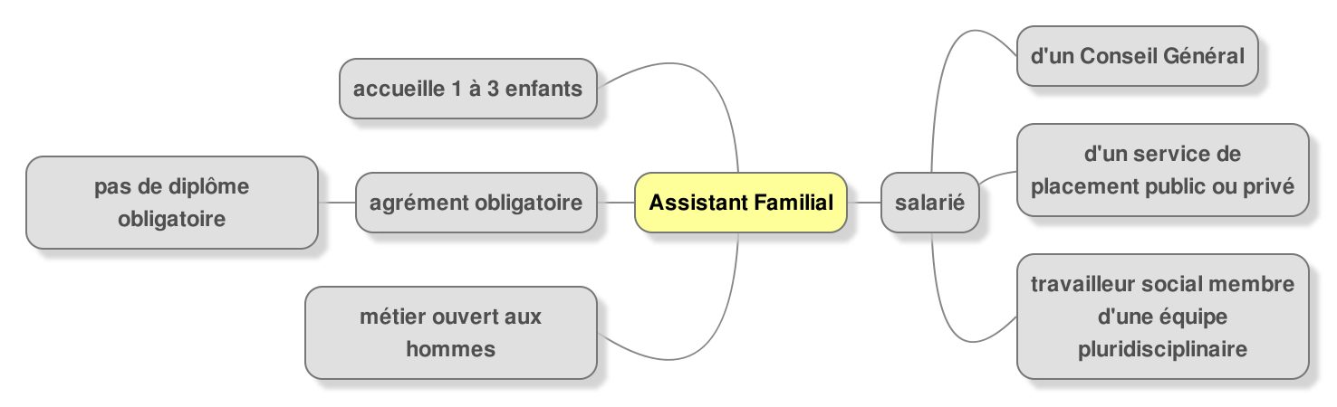 La profession en pratique (Paris, 2015)